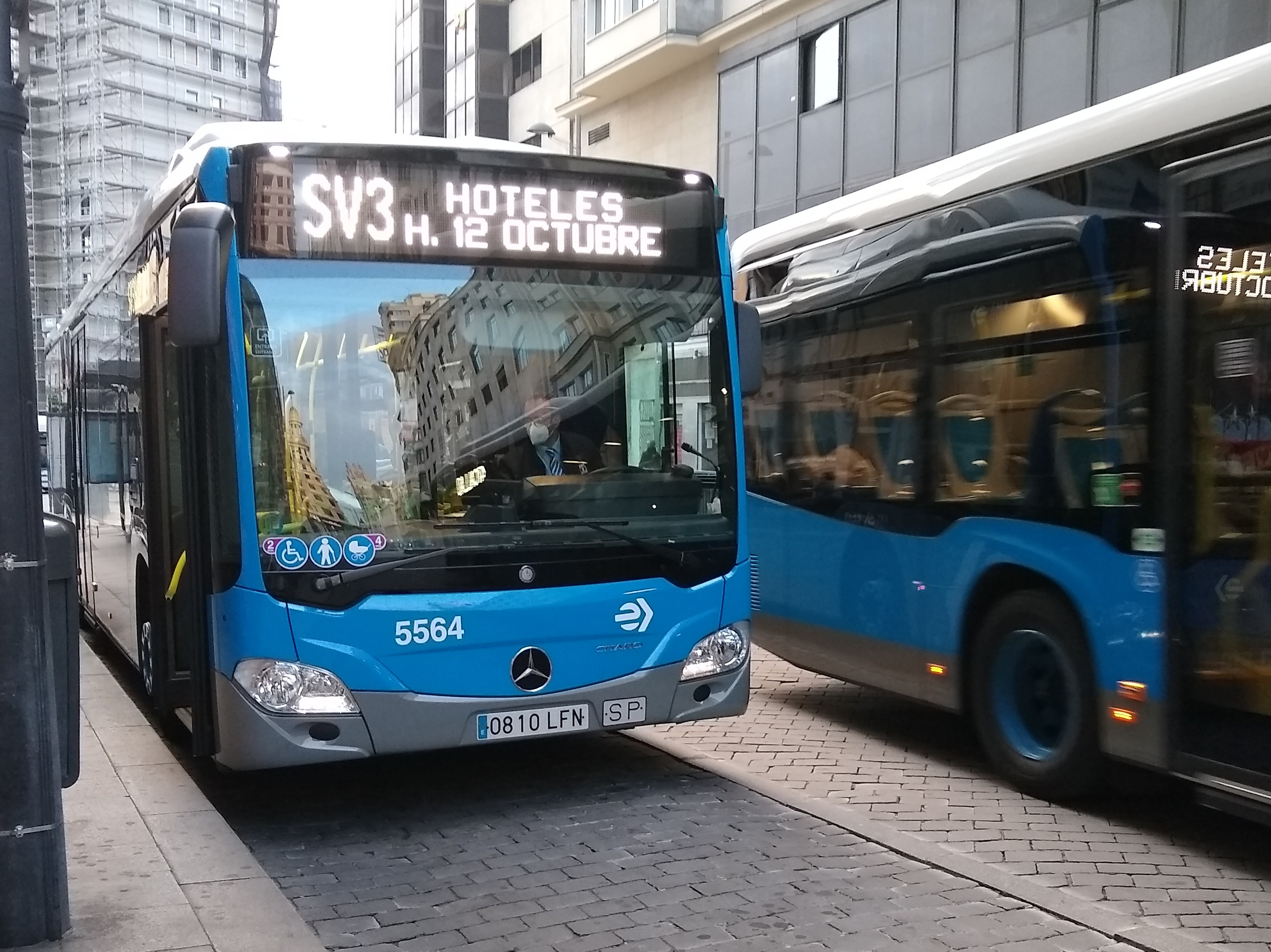 bus de voluntarios